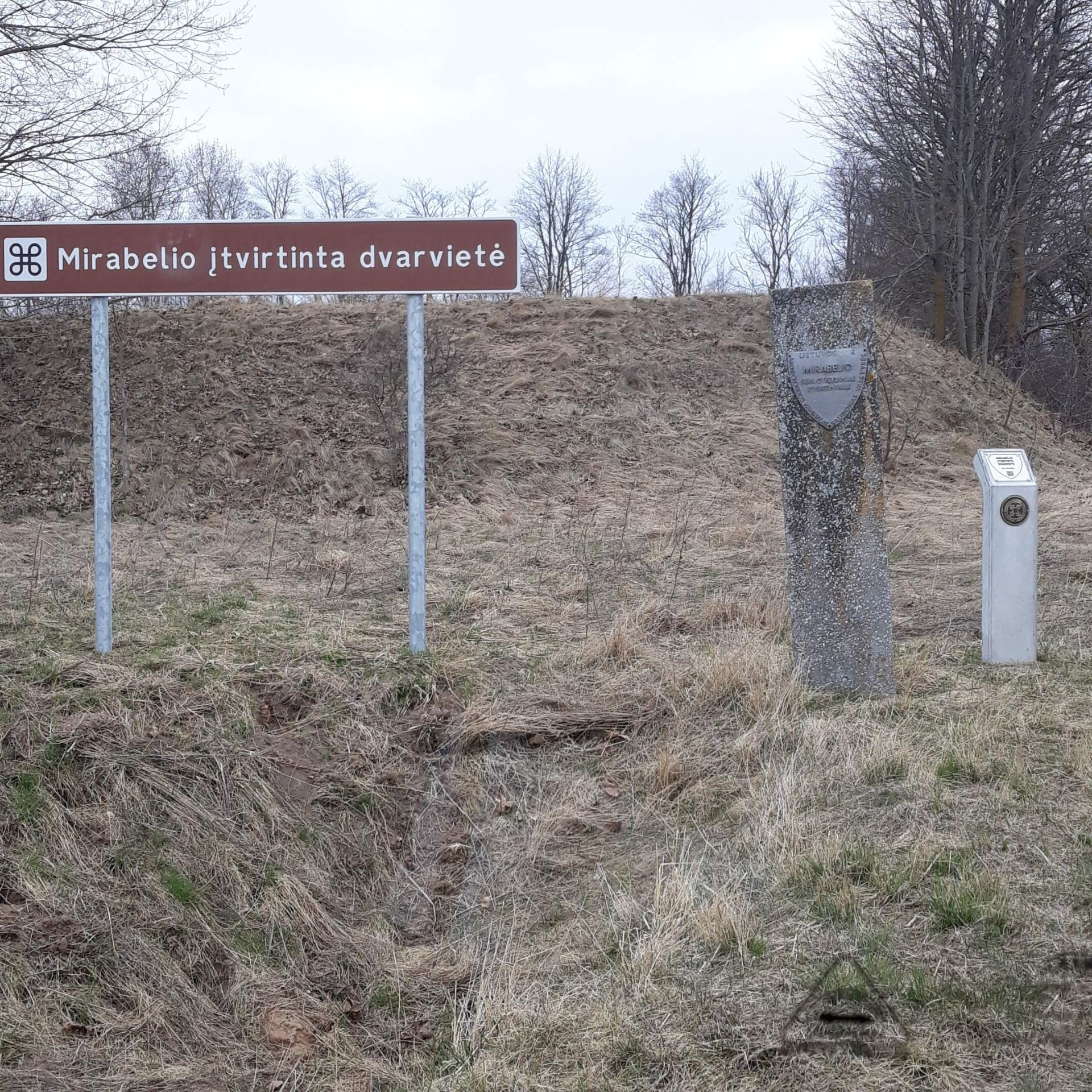 Mirabelio dvarvietė